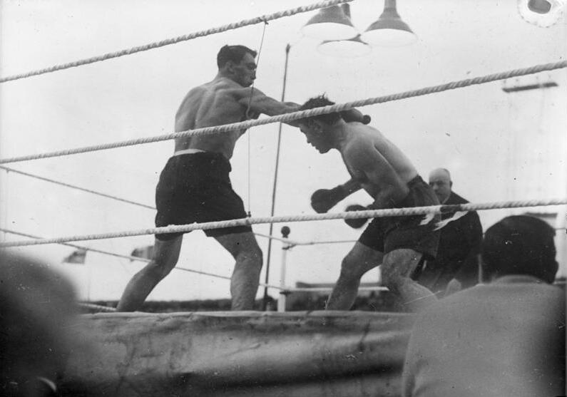 Der grosse Boxkampf des italienischen Riesen Carnera gegen den Spanier Paolino! Der italienische Riese Carnera landet einen seiner furchtbaren Rechten gegen Paolino.